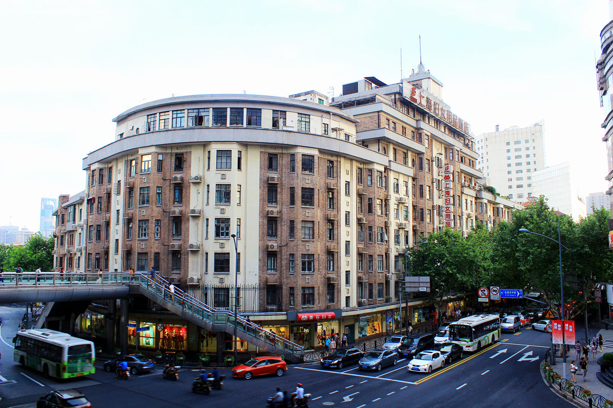 中文（中国大陆）: 淮海中路培文公寓